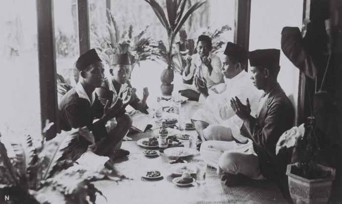 Foto. Gebed tijdens een selamatan op Java